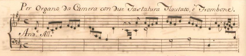 L'annotation « Per Organo… » de la sonate K. 287, telle qu'elle se présente dans le manuscrit de Parme, volume VII no. 17.